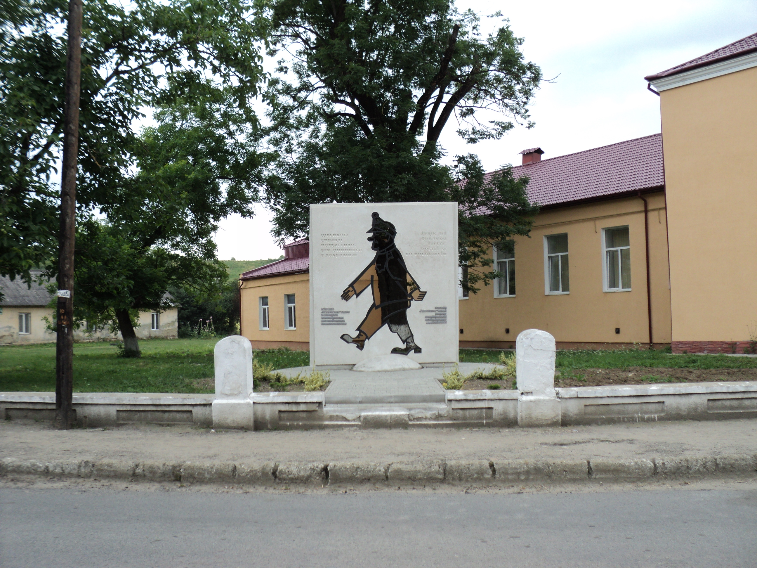 Пам'ятний знак Швейку в Добромилі (Львівська обл., Україна). 2019 рік.